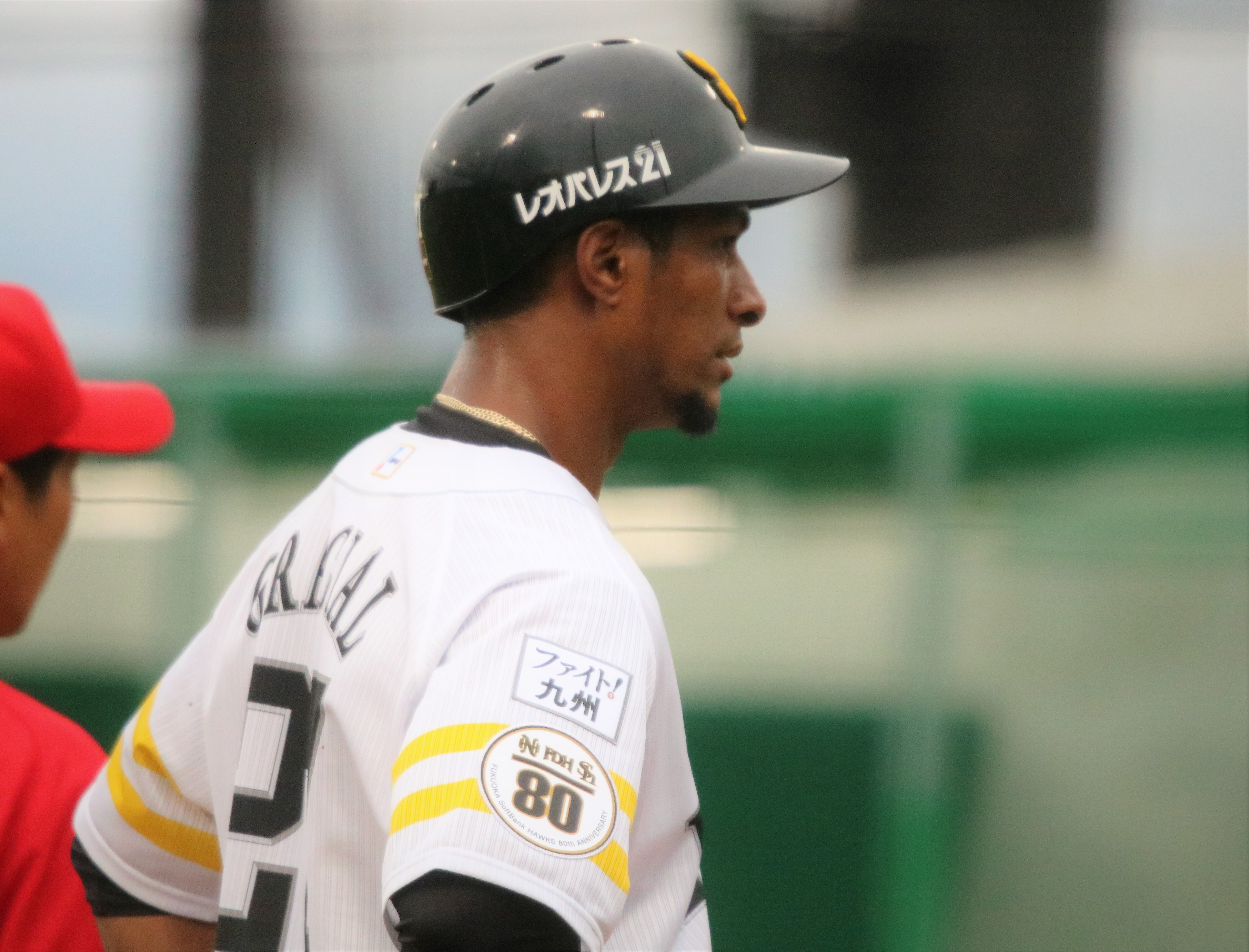 2018/4/6 タマホームスタジアム筑後 室内練習場